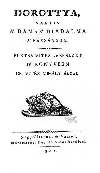 A Dorottya című vígeposz első kiadásának címlapja.